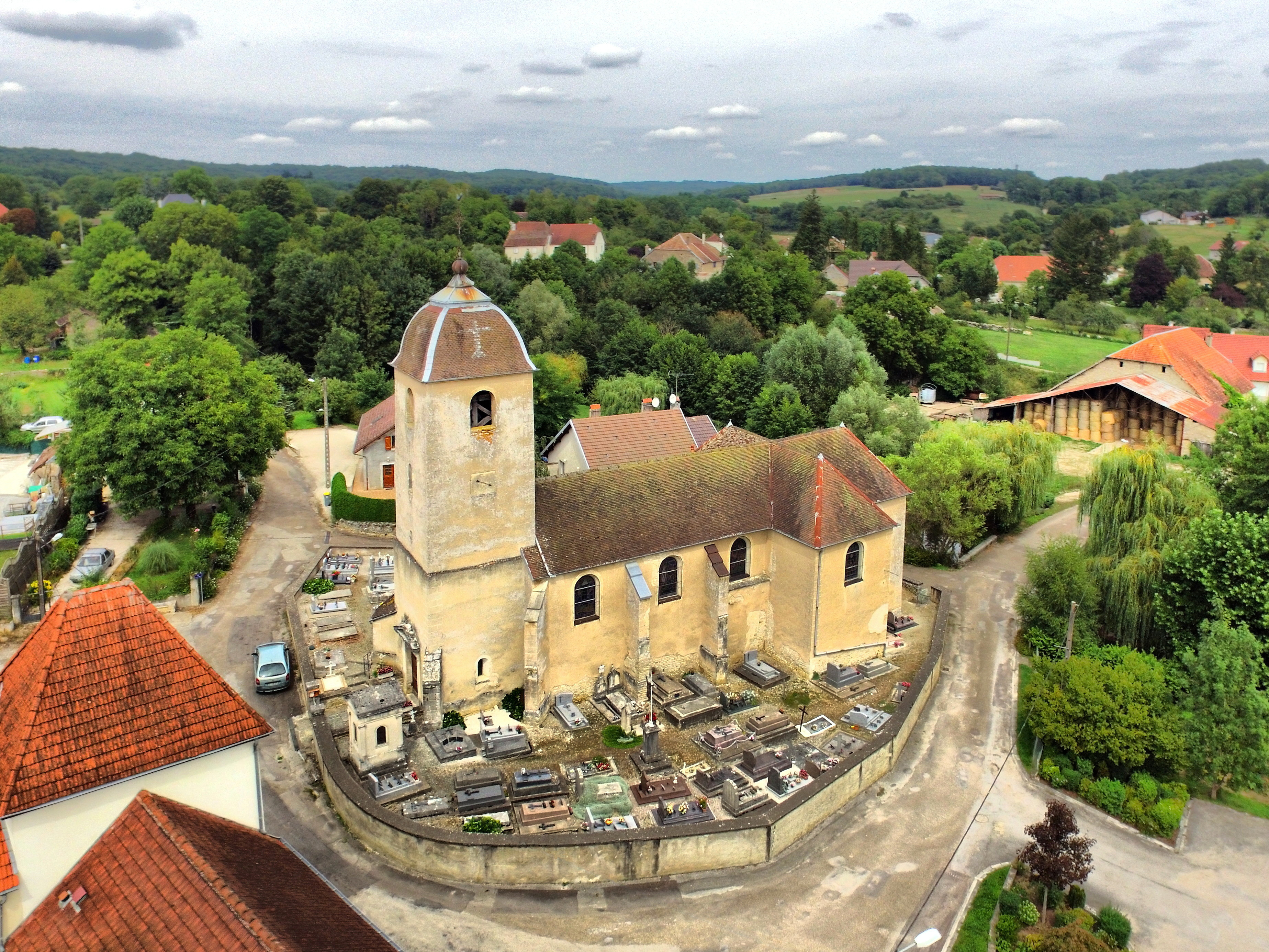 Undetermined language : L'église